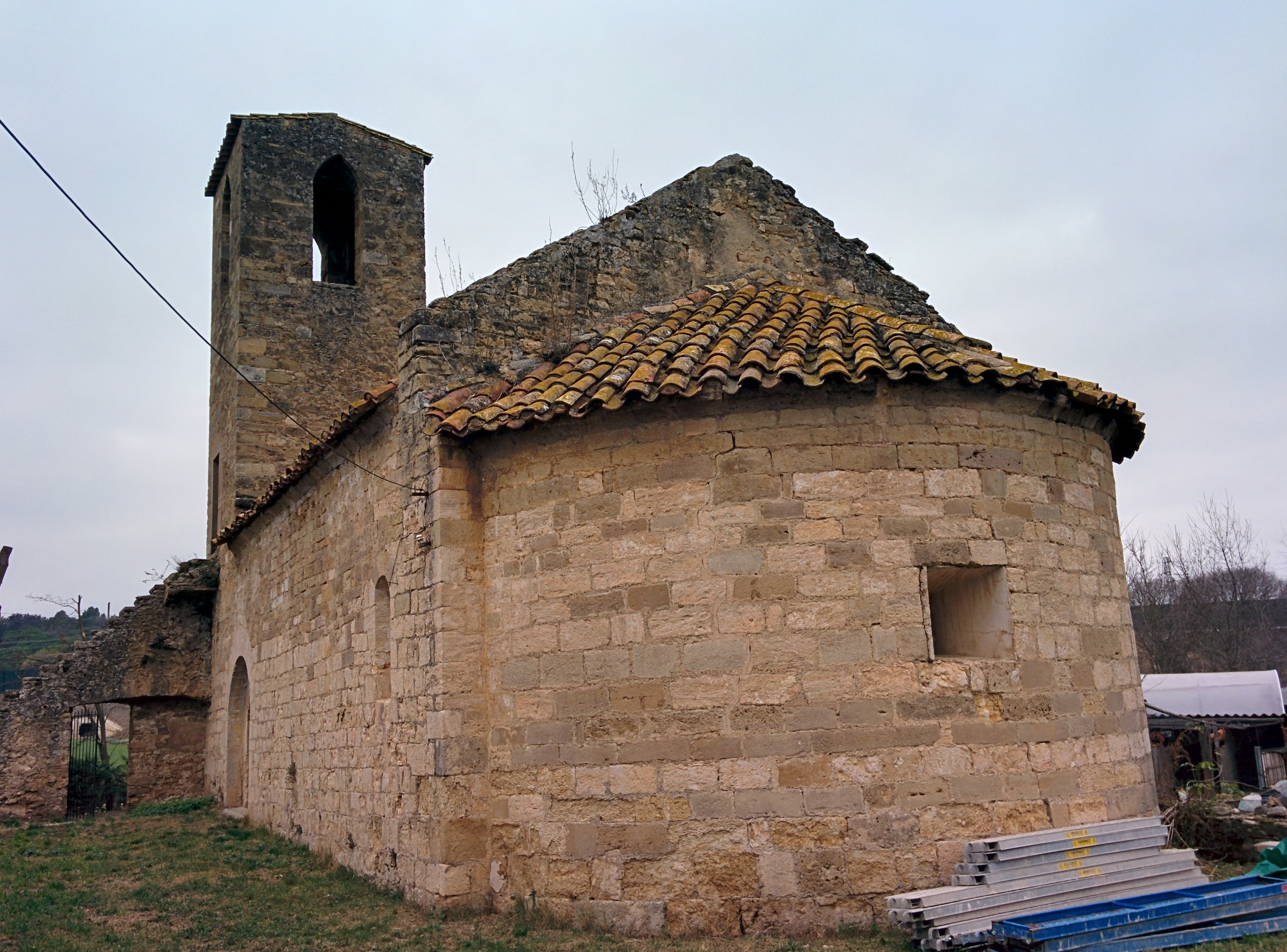 Església de Sant Andreu (Cornellà del Terri)